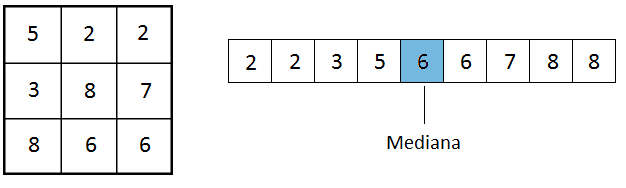 Detalhe mediana